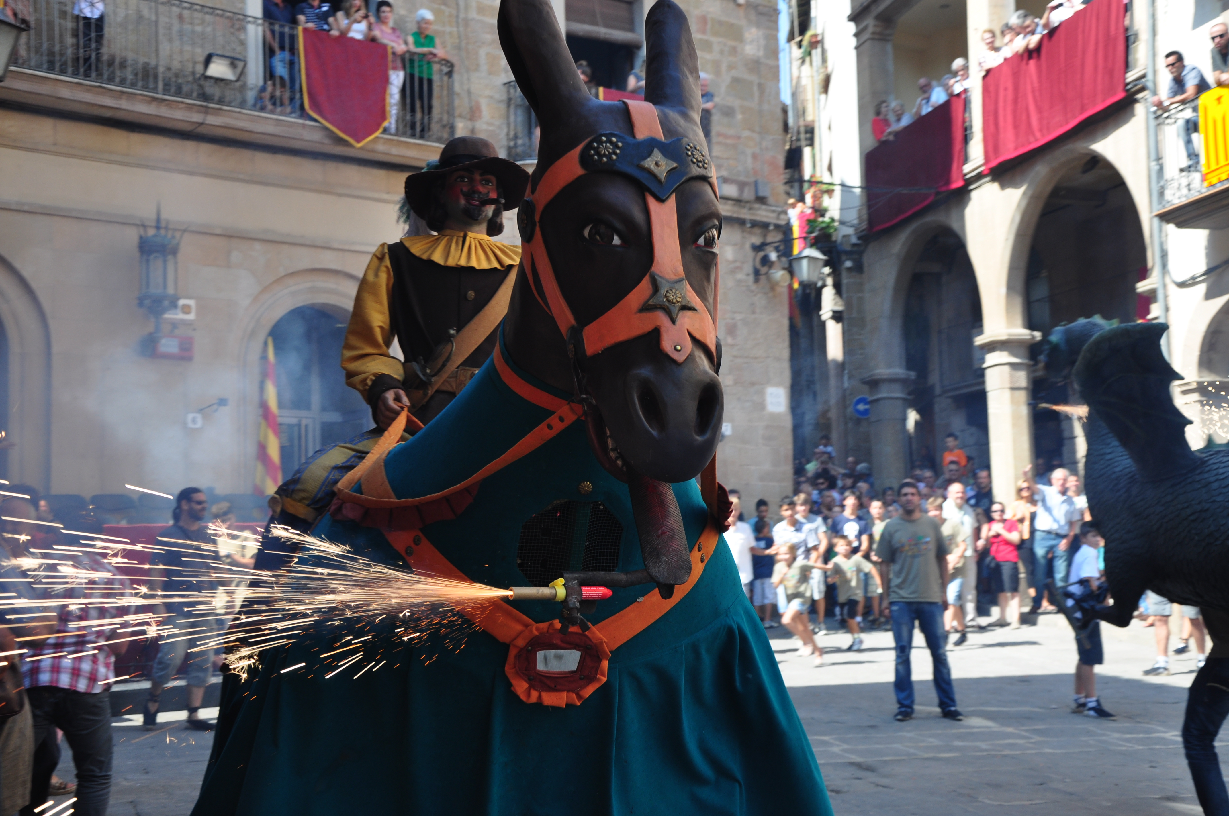 Festa Major de Solsona, 2012 - Mulassa